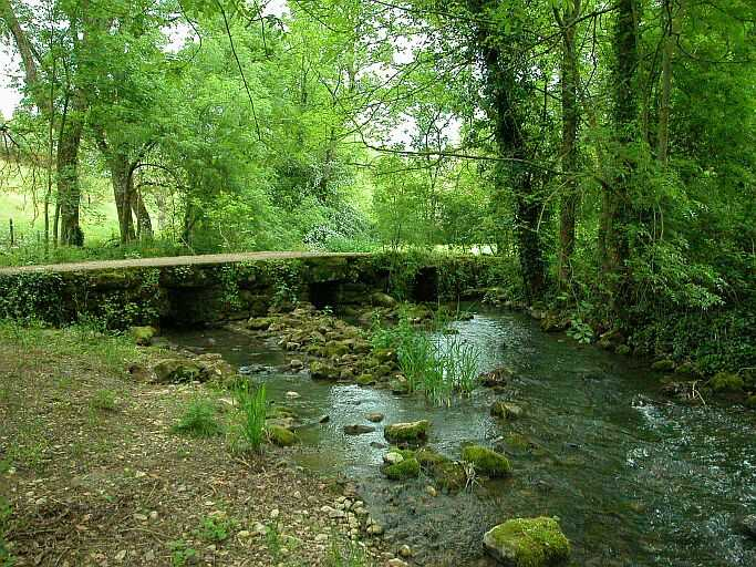 Photo prise dans les environs de Mougon à Montaillon (vallée du Lambon)